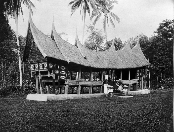 Foto. Het dorpshuis in Minangkabause bouwstijl te Batipoe, Sumatra`s Westkust